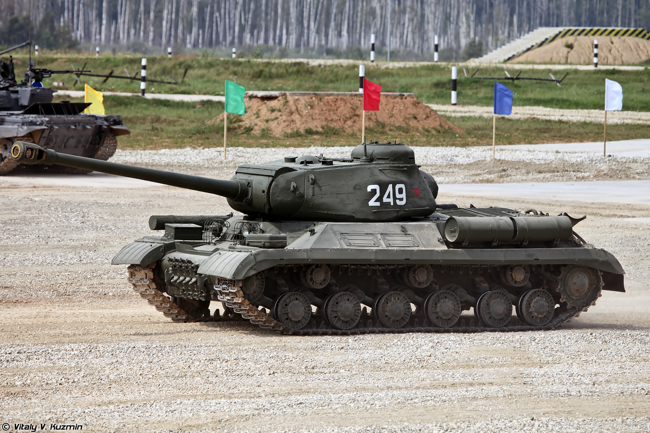 ИС-2 (IS-2)